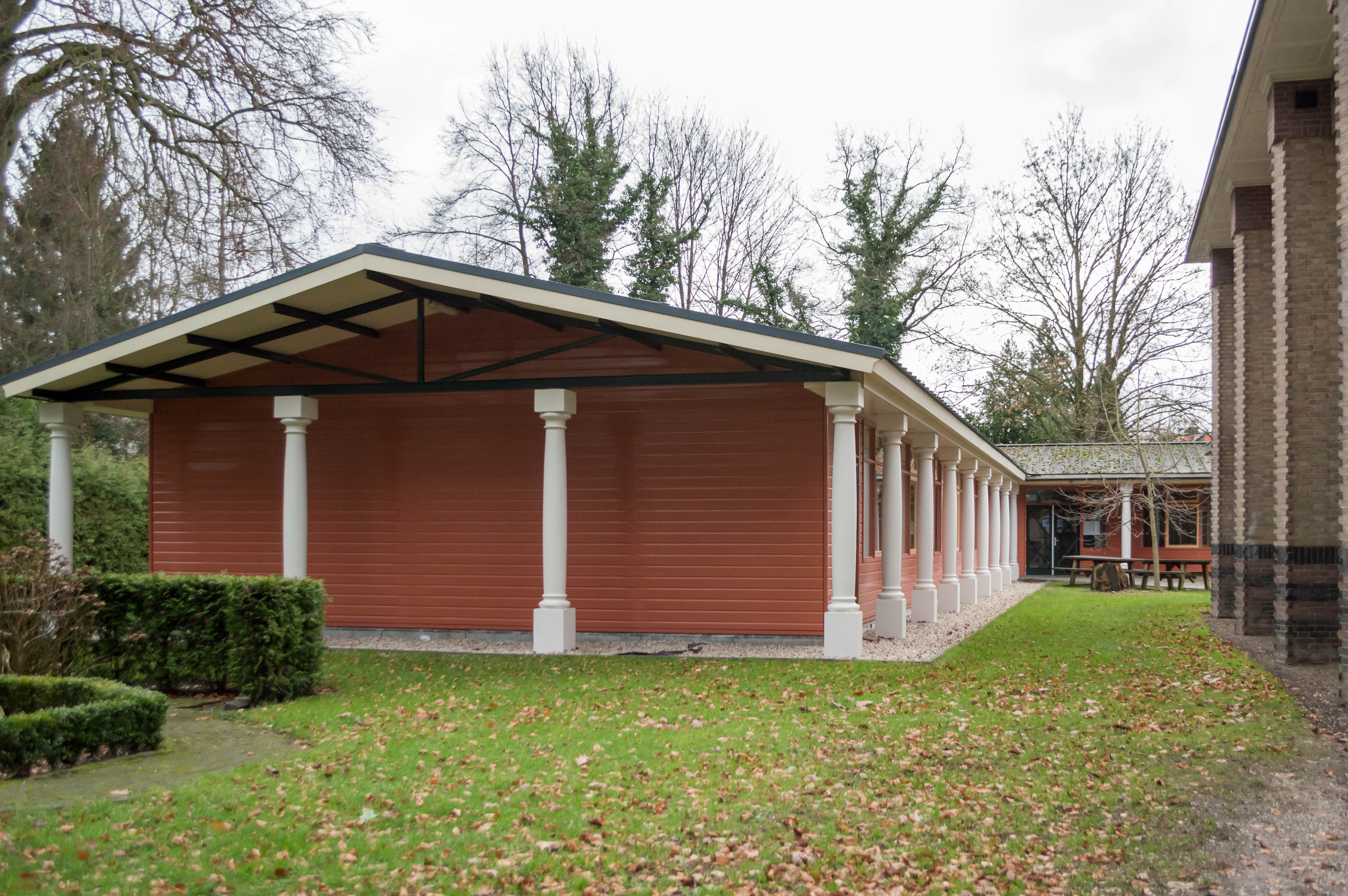 De binas van het Gymnasium Apeldoorn met rechts in beeld een stukje van de gymzaal.